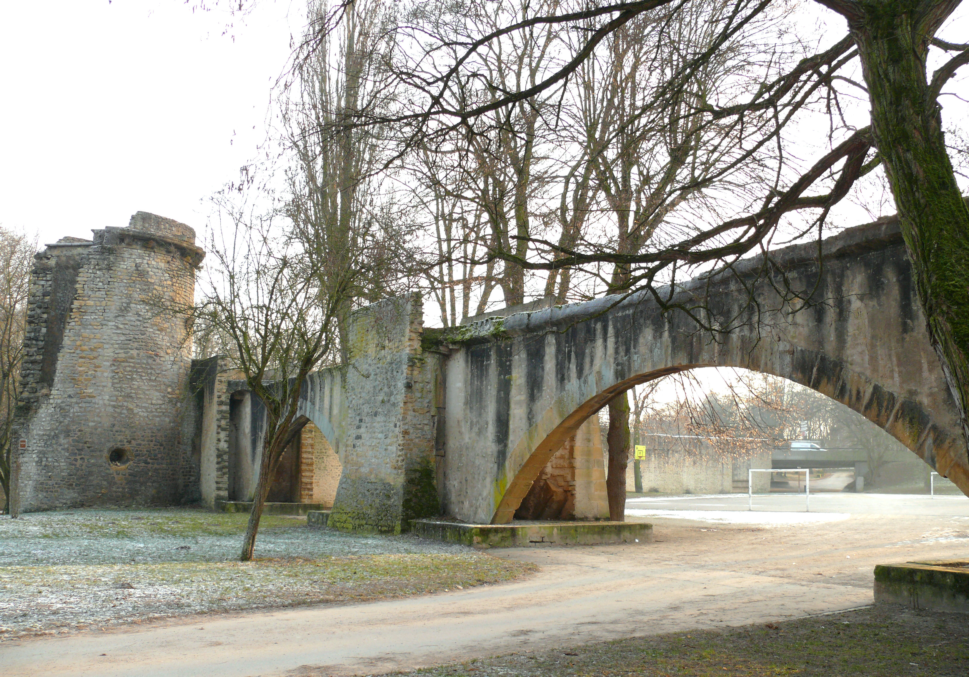 Metz - Pont des Grilles de la Basse Seille